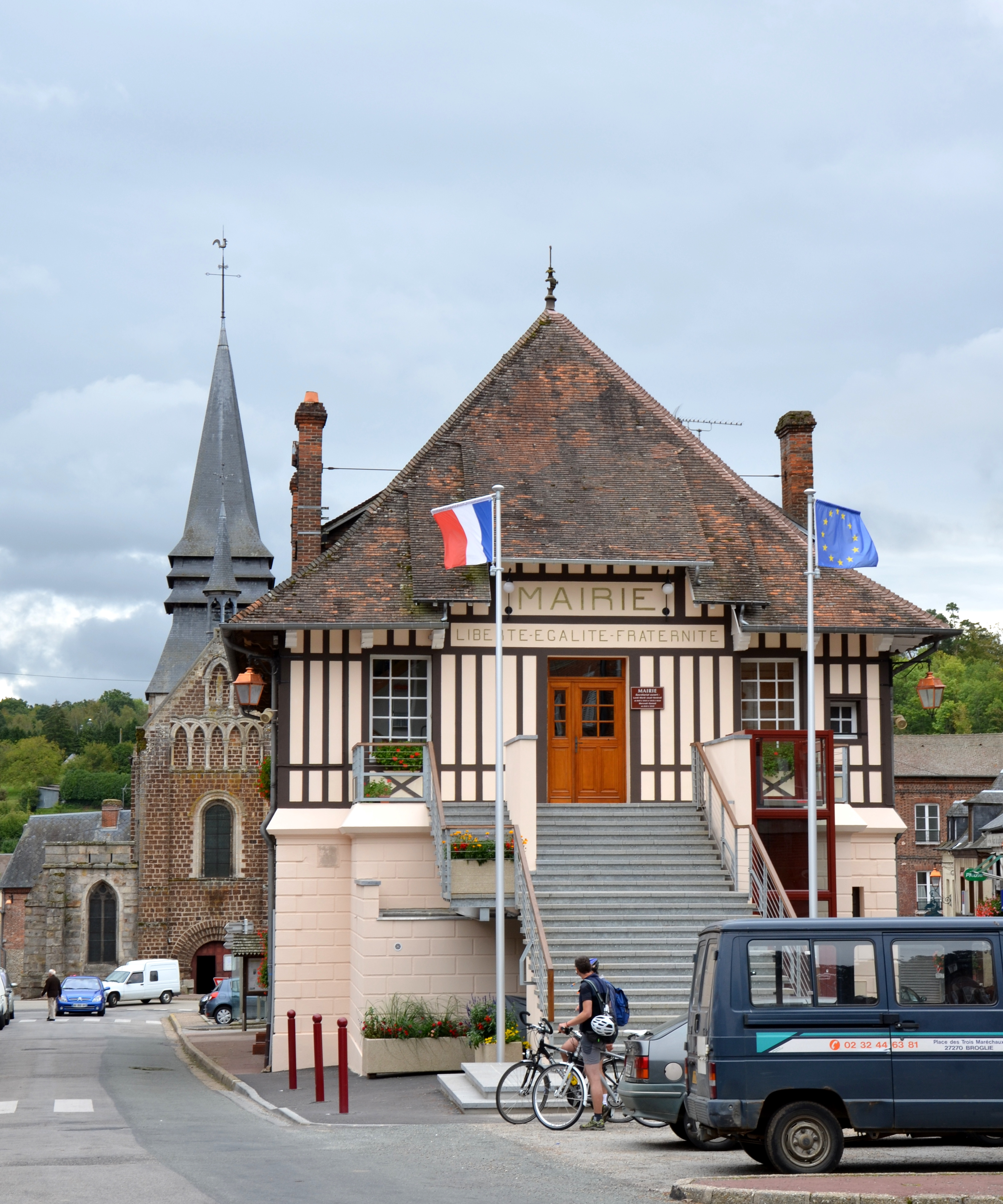 Église et mairie de Broglie, Eure, France .